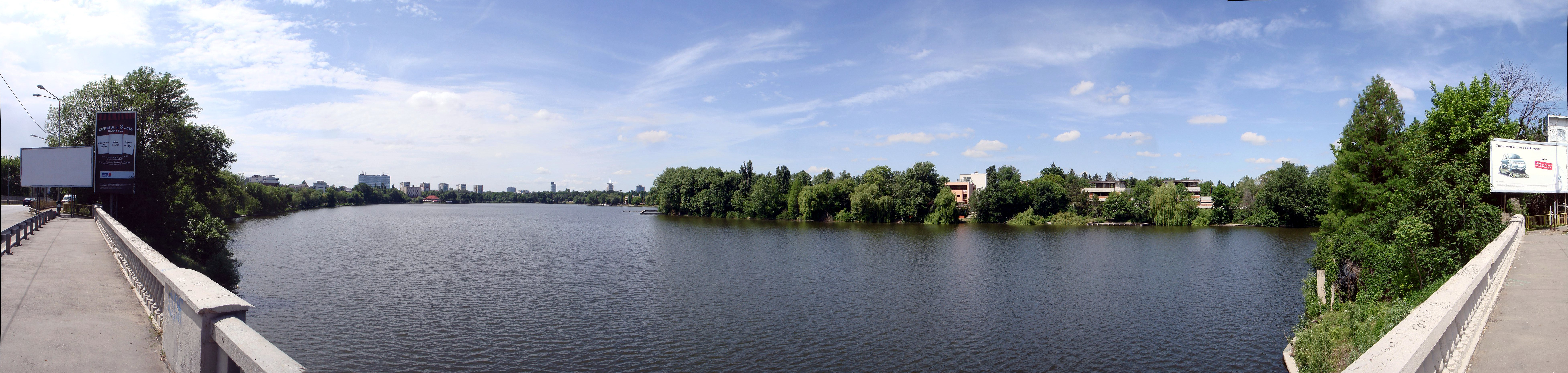 București: Lacul Floreasca văzut de pe podul traversat de Calea Floreasca. Panoramă compusă din 9 imagini cu Microsoft ICE144 și ajustată cu GIMP